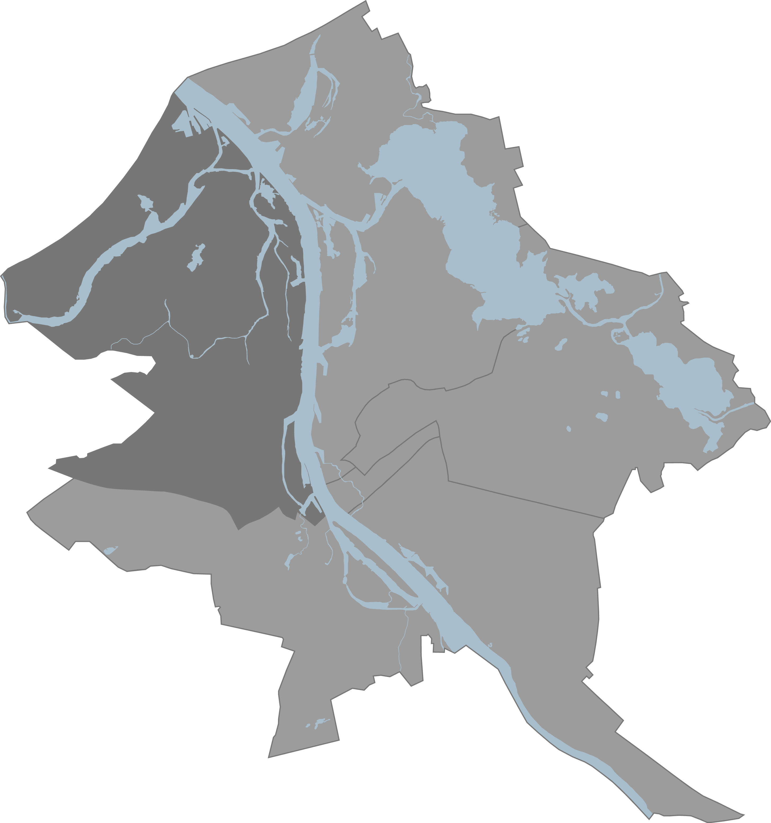 Riga Kurzemes rajons karte.png